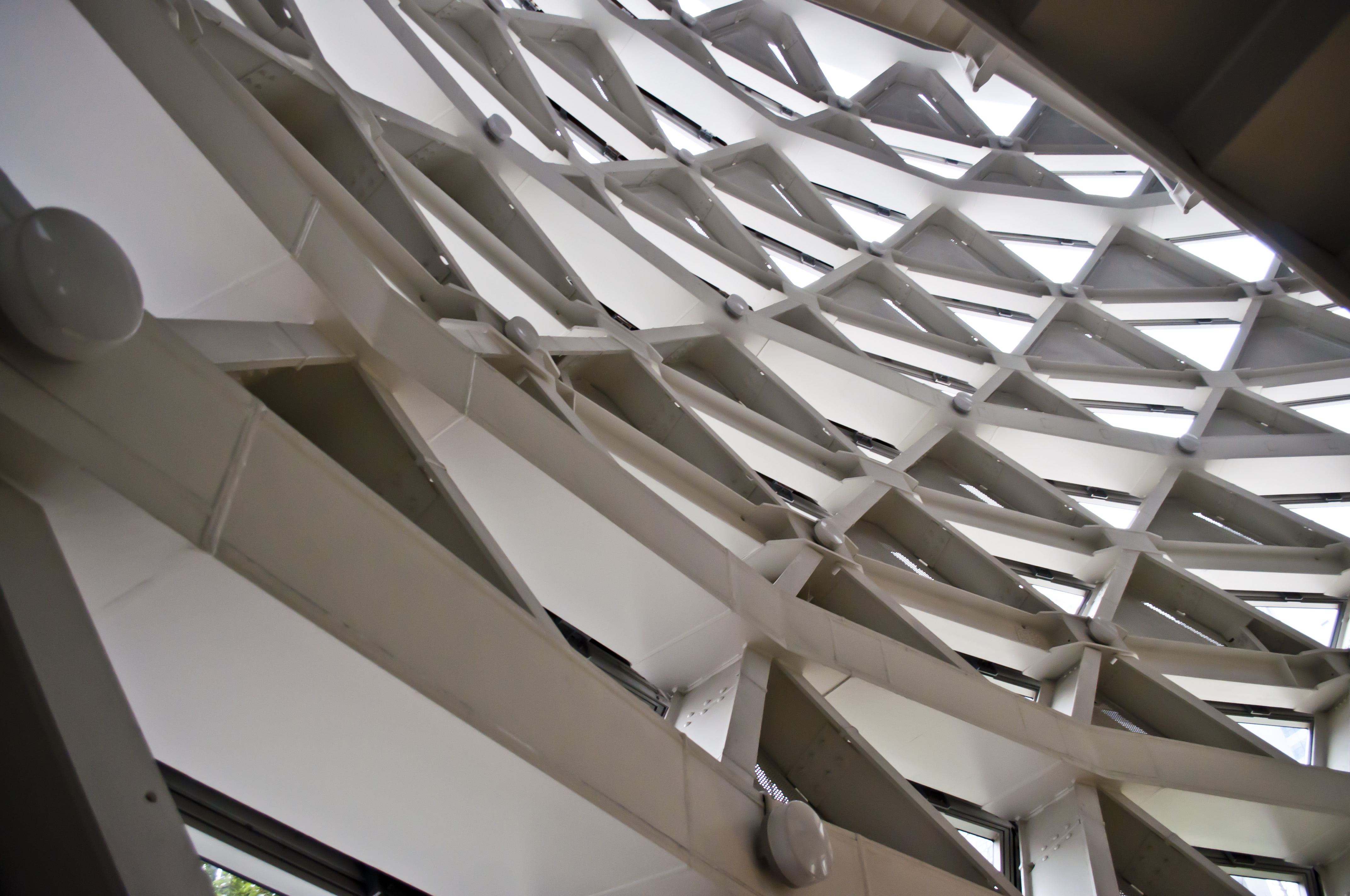 モード学園コクーンタワーの内側